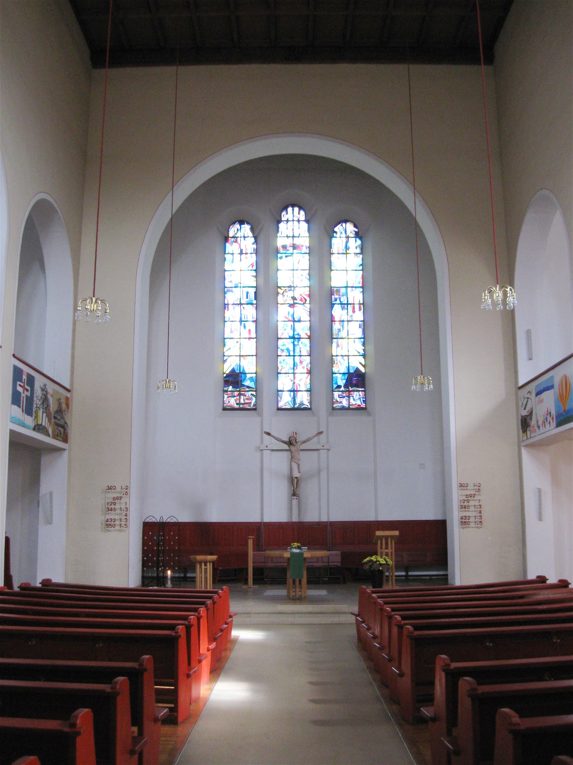 Martin-Luther-Straße 4; Evang.-Luth. Lutherkirche samt Pfarrhaus, Baugruppe mit Turm, historische Anklänge, 1926–27 von Hans Grässel; städtebauliches Pendant zur Hl. Kreuz Kirche Giesing (siehe Ichostraße 1).